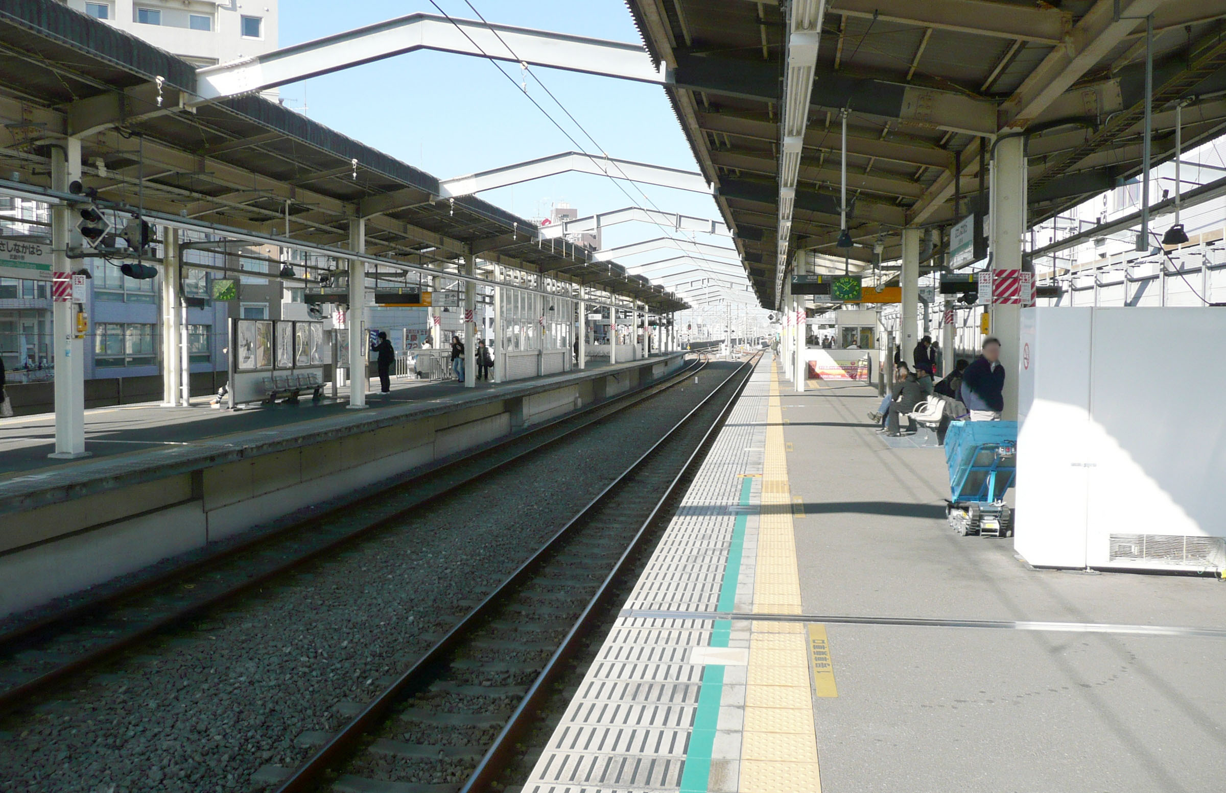 武蔵中原駅ホーム